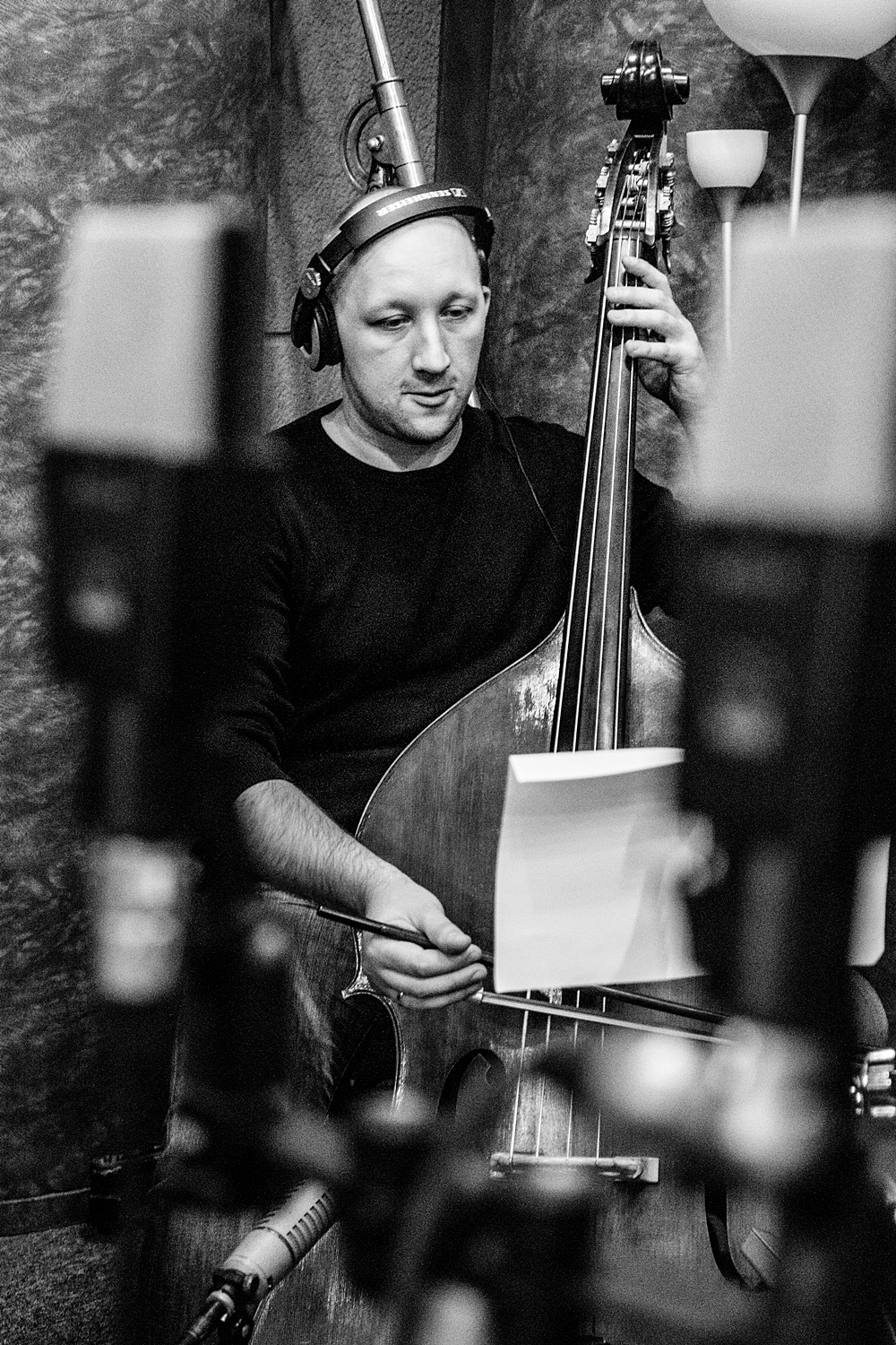 Jarosław Stokowski, zdjęcie.